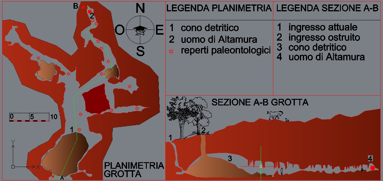 grotta di Lamalunga: luogo di ritrovamento dell'"uomo di Altamura"